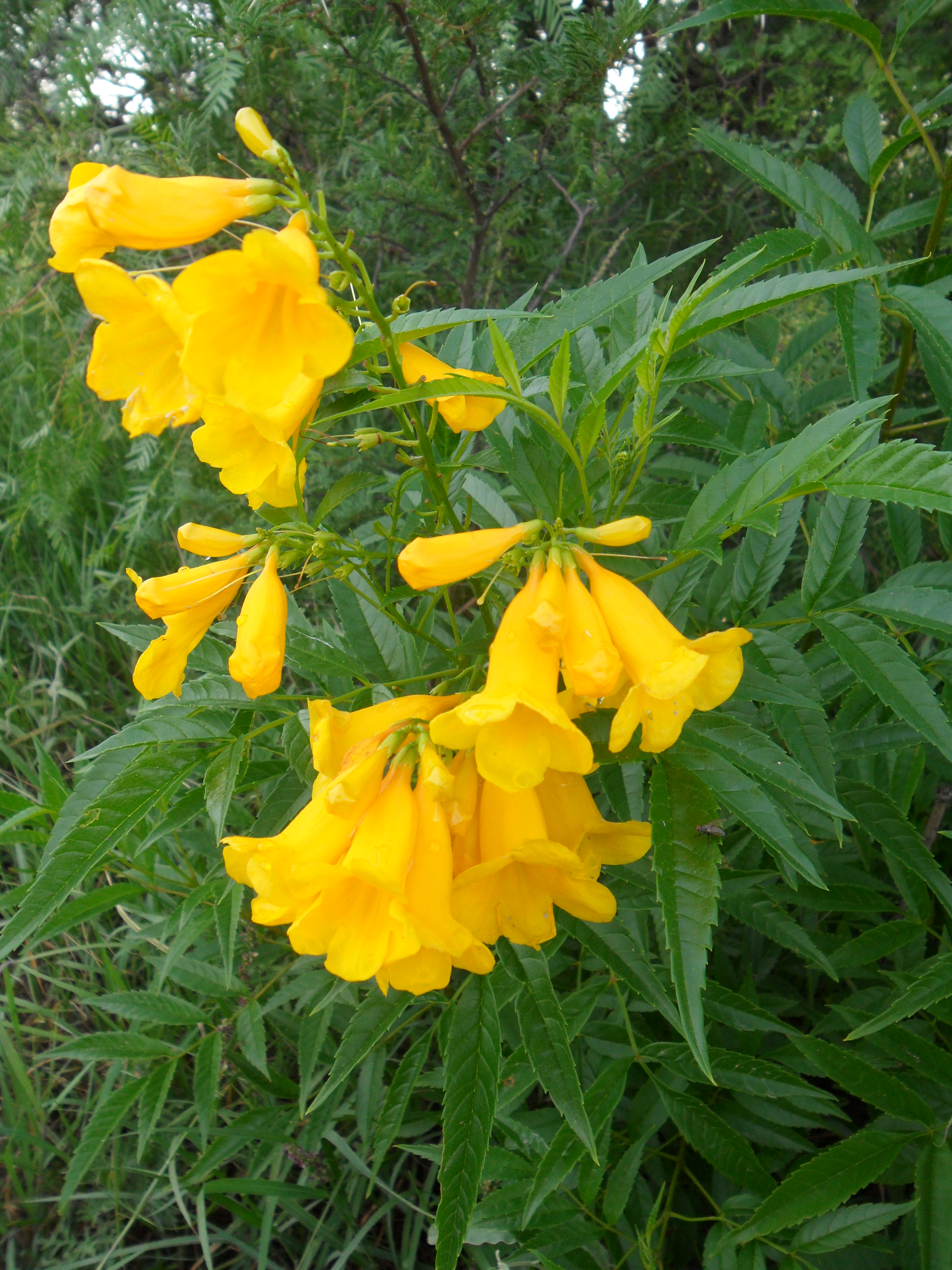 Planta del norte de México